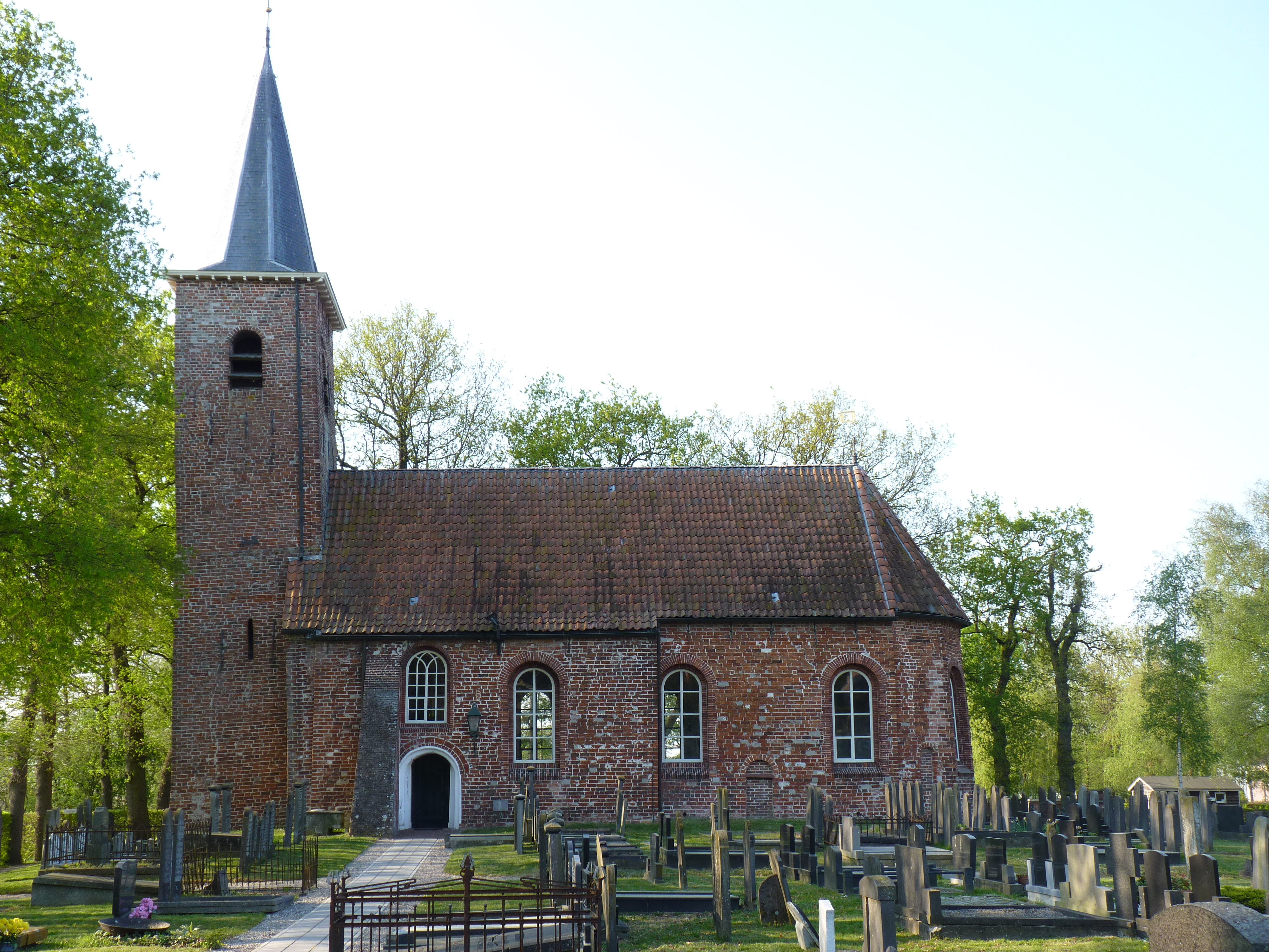 Marum Kerk